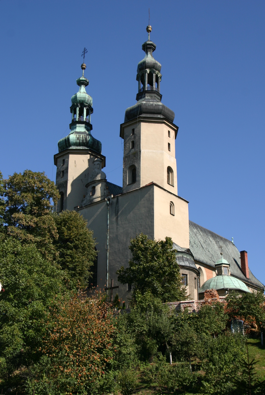 Głogówek, ul. Kościelna 4 - rzymskokatolicki ościół parafialny pw. św. Bartłomieja (1380-XVIII w.)